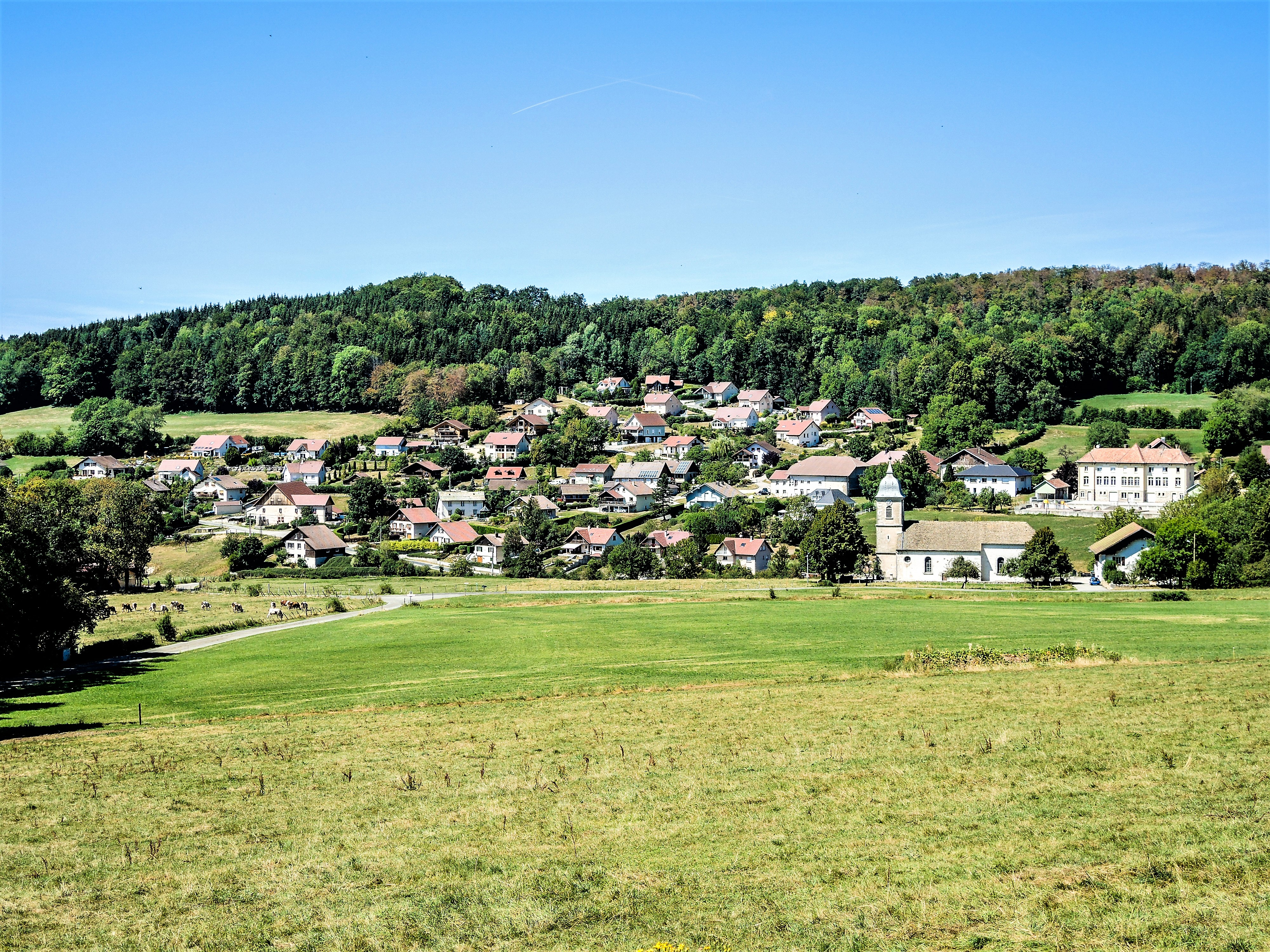 Village des Bréseux, vu de la route de Maîche. Doubs